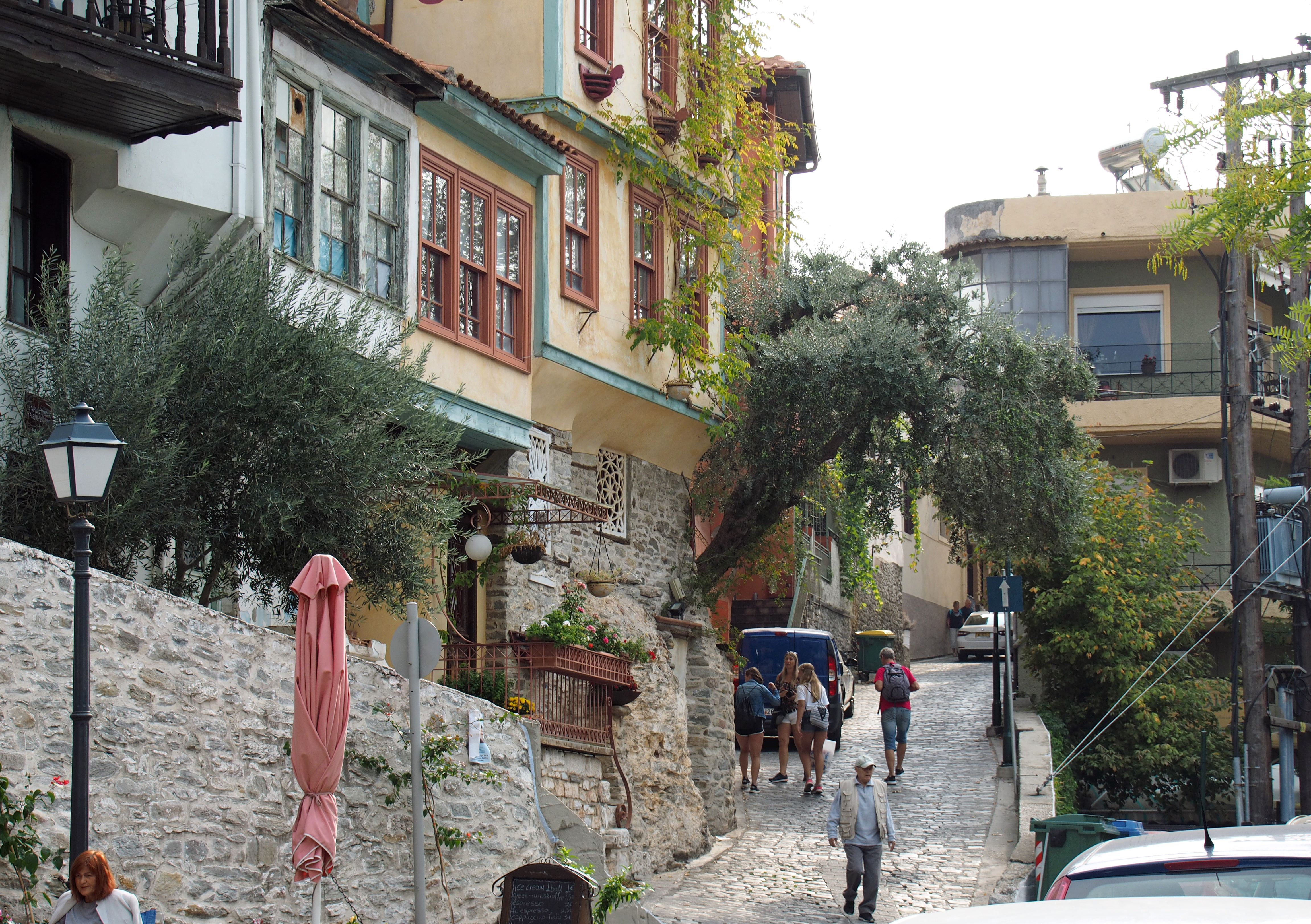 Straße Mehmet Ali in Kavala (Griechenland)